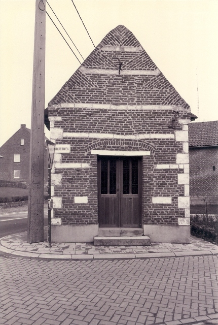 Borgloon Truierweg zonder nummer